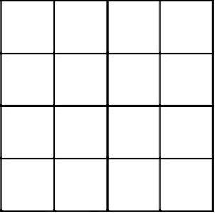 虎棋棋盤的一種。